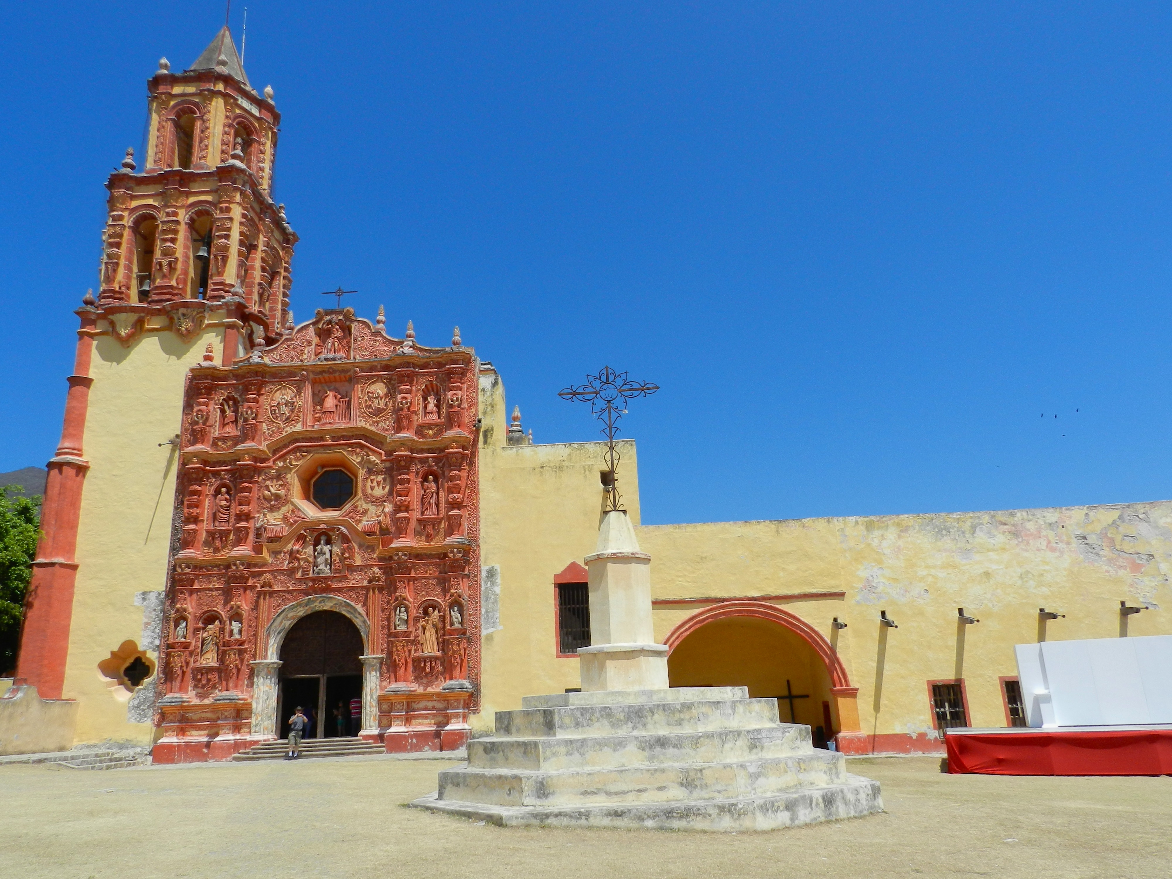 Misión Franciscana en Landa de Matamoros, Querétaro.